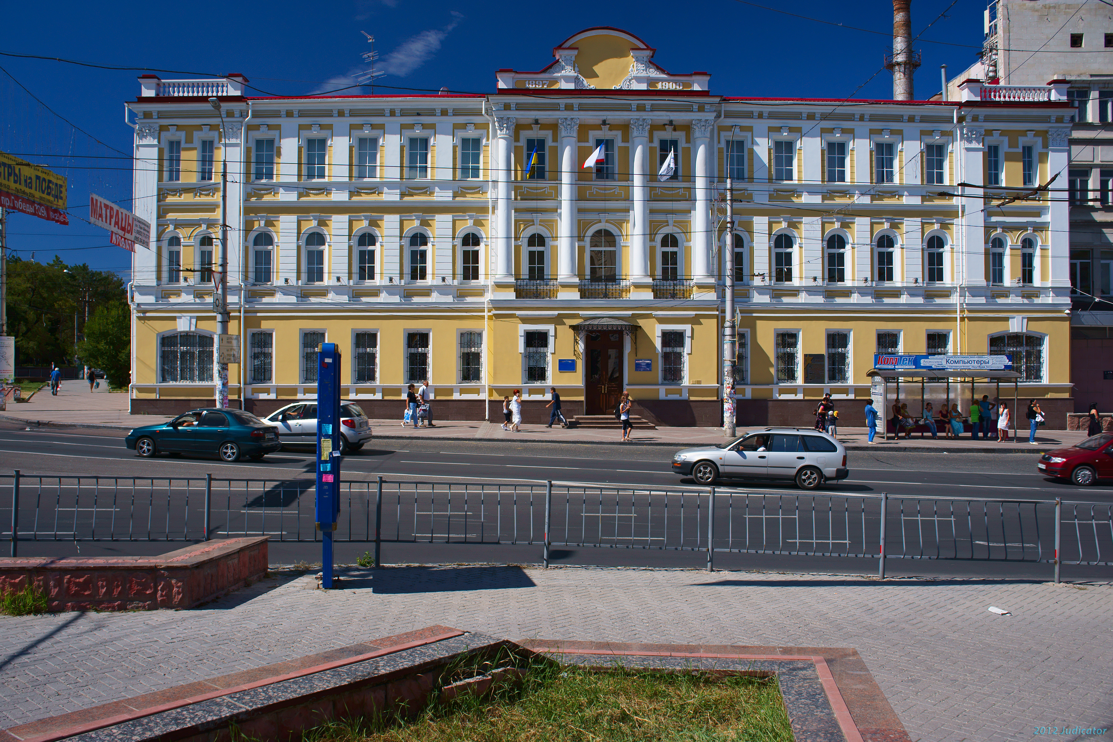 м.Сімферополь, Колишня казенна Таврійська палата